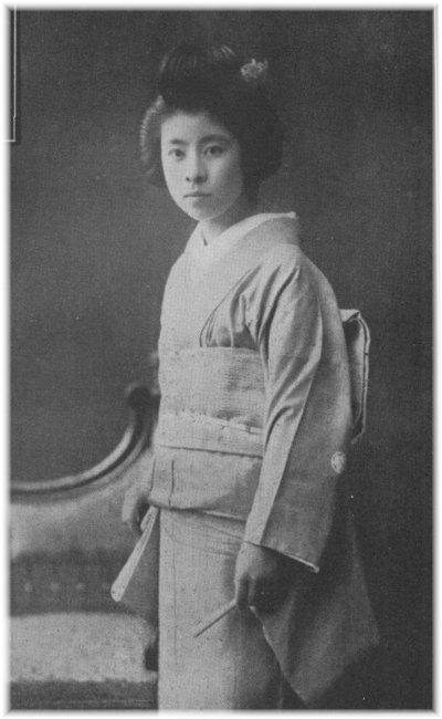 小村欣一（小村寿太郎の長男）の妻、男爵平山成信の娘、小村（平山）温子